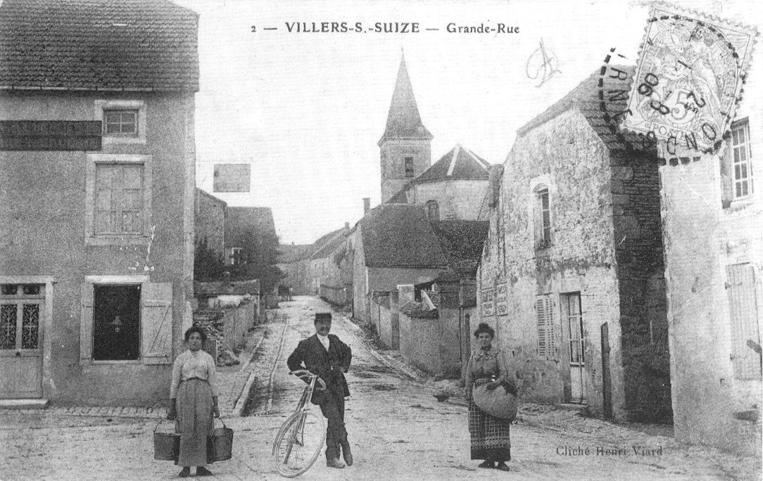 Carte postale ancienne Grande-Rue de Villiers-sur-Suize, Haute-Marne, France